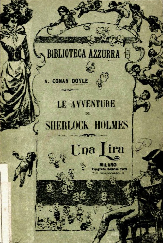 Le avventure di Sherlock Holmes